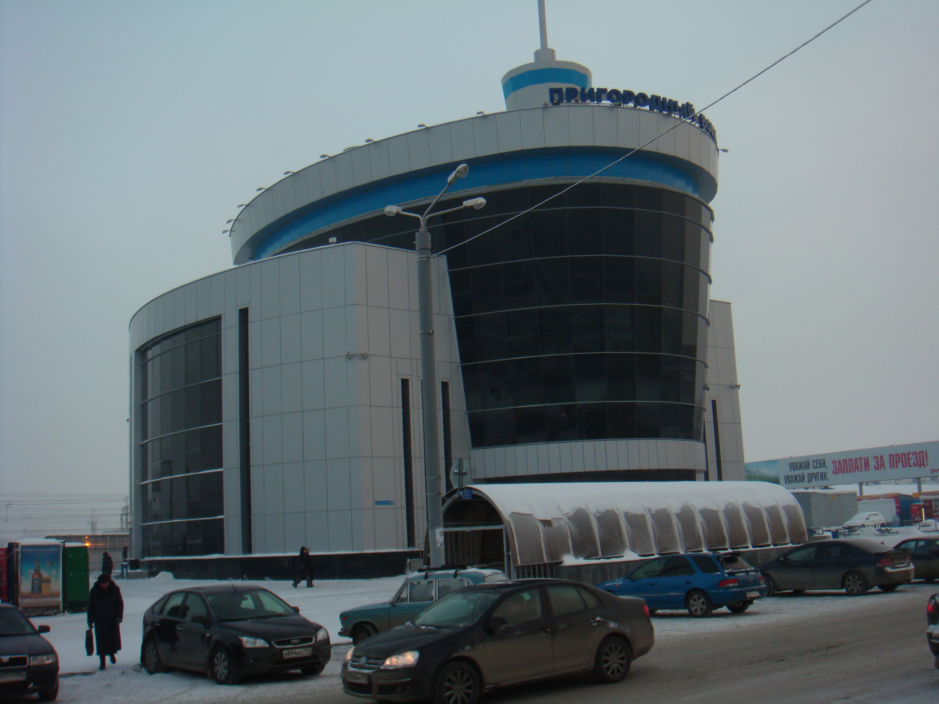 Новый Пригородный вокзал в Челябинске